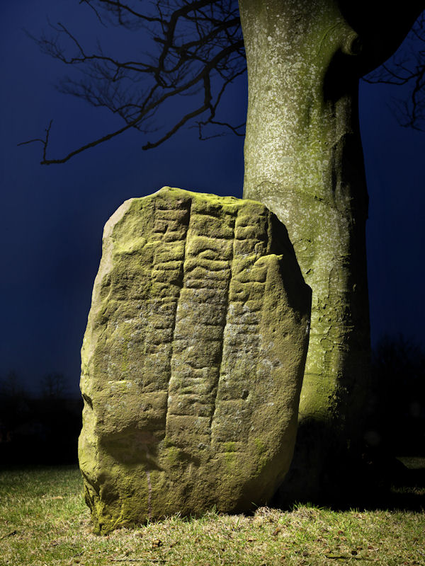 Foto: Nationalmuseet ved Roberto Fortuna